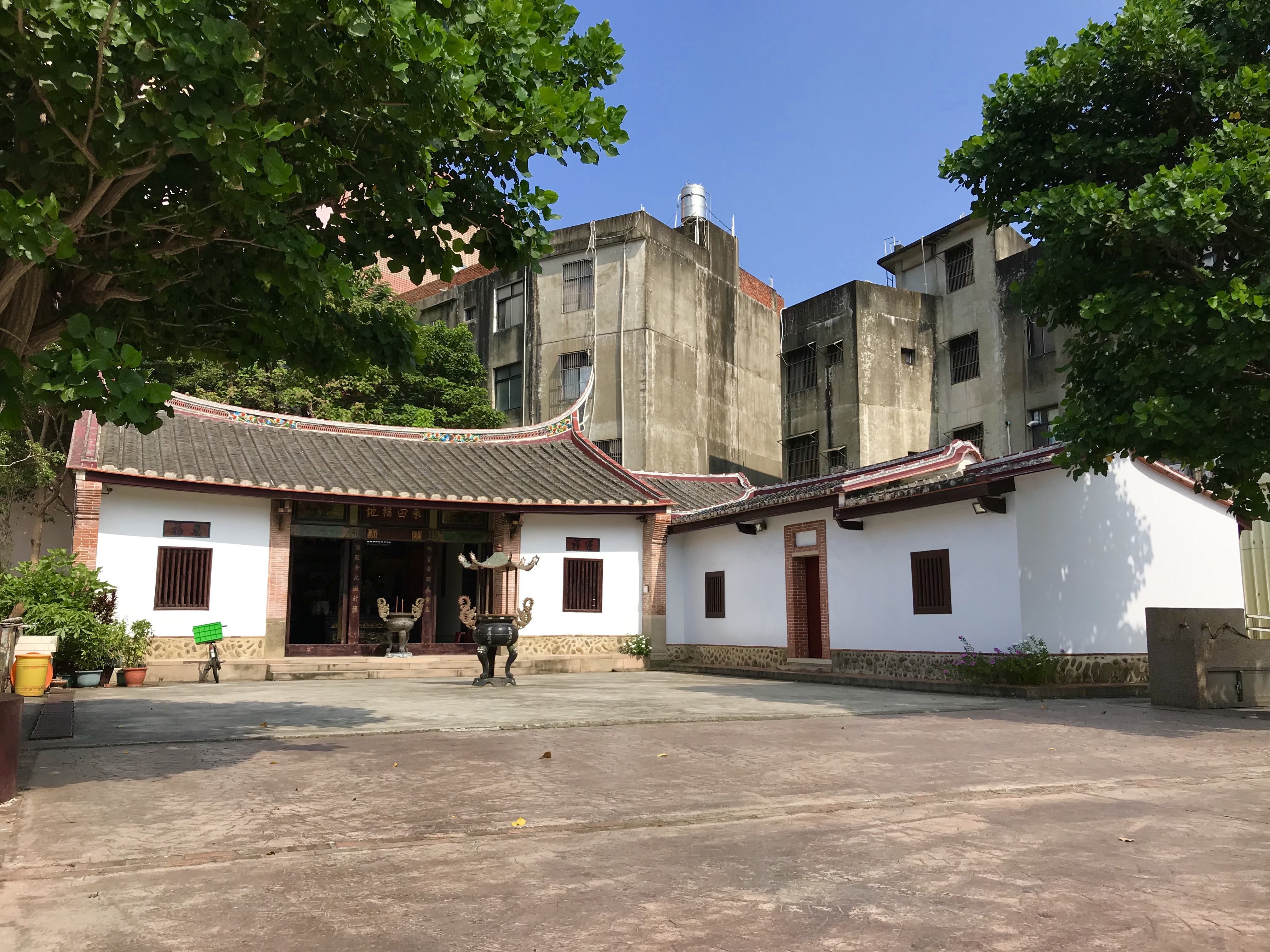 竹北采田福地斜照